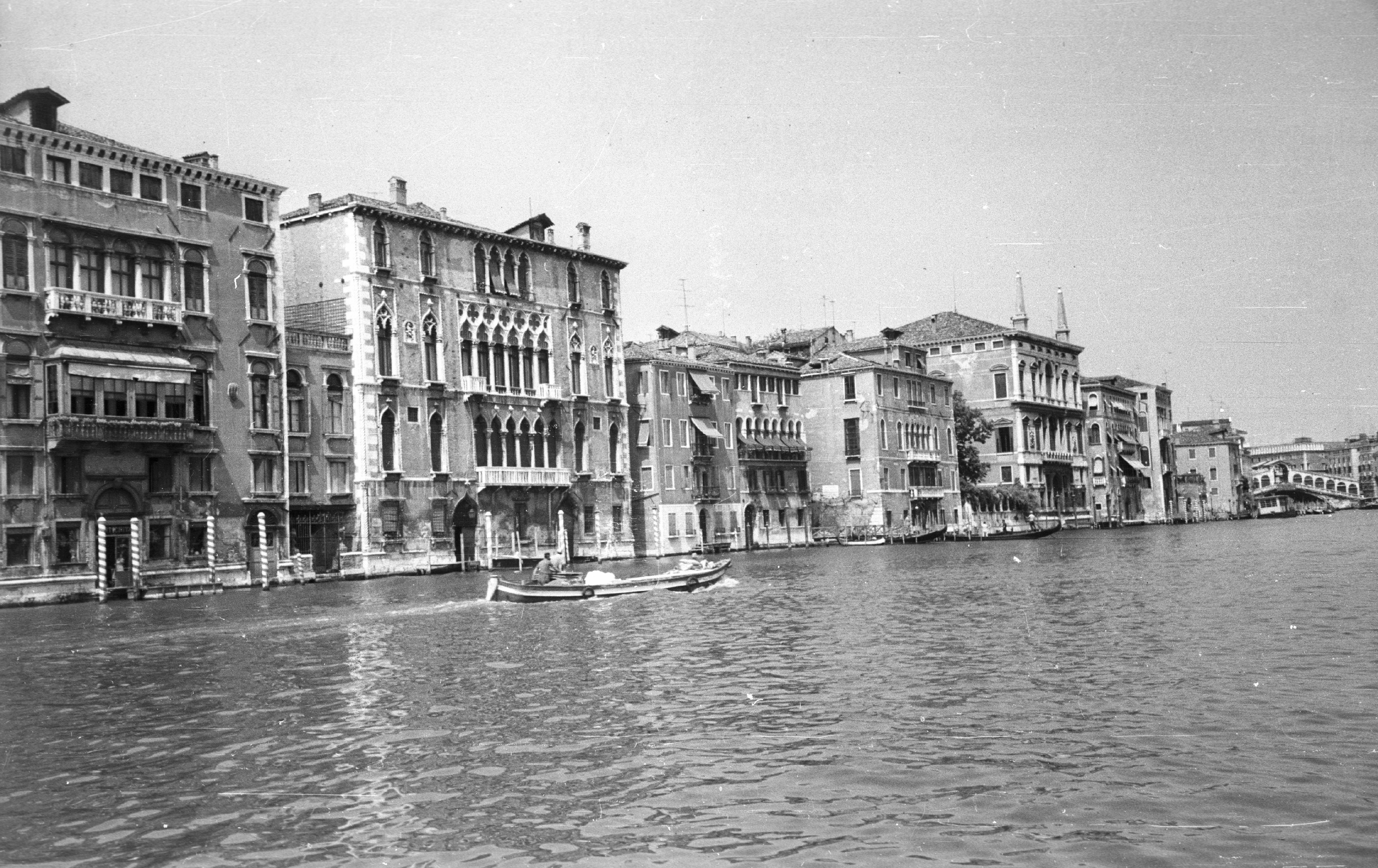 Canal Grande, balról a Palazzo Bernardo. Location: Italy, Venice Title: Canal Grande, balról a Palazzo Bernardo.